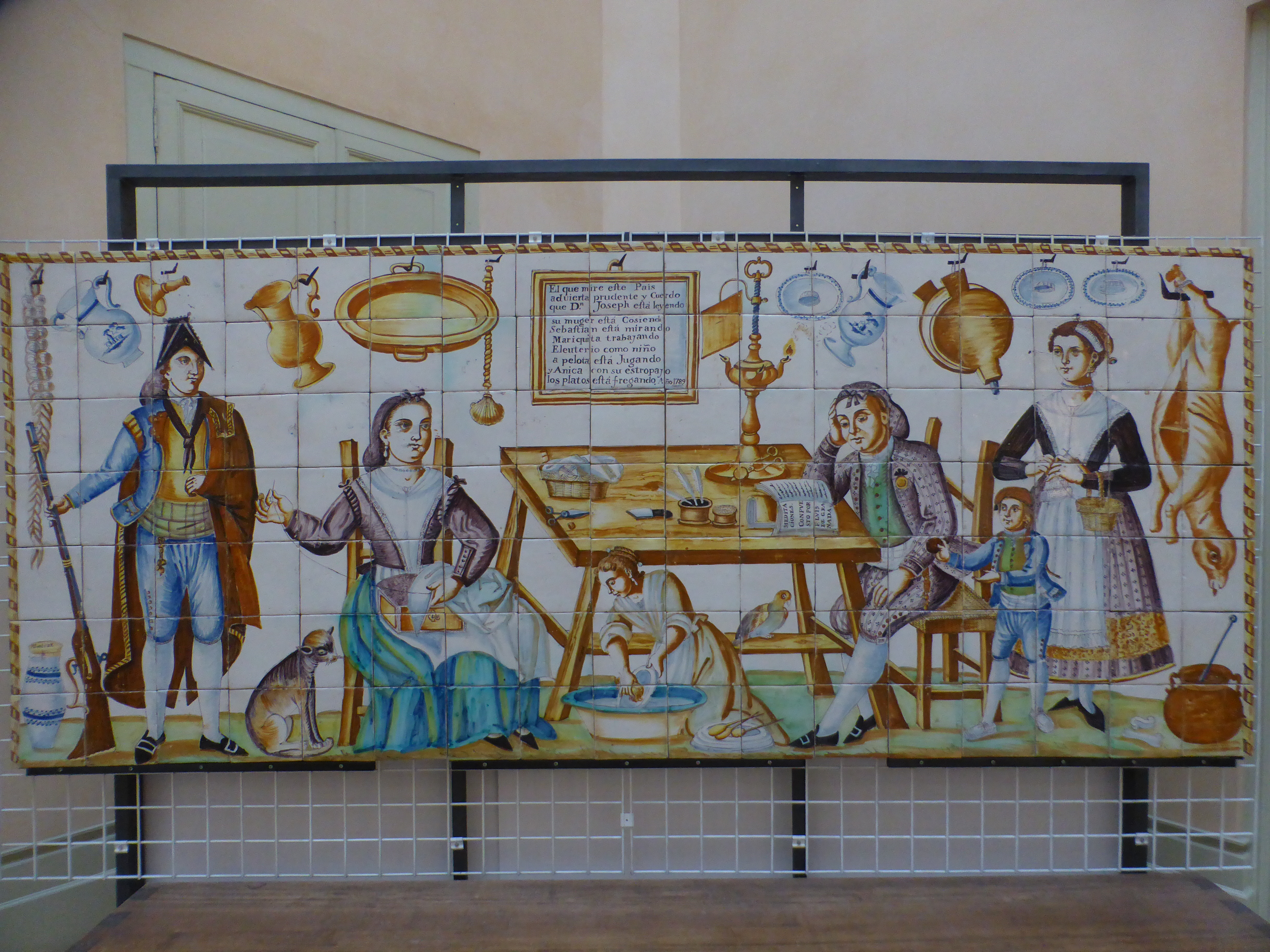 En el "Museo Nacional de Cerámica y Artes Suntuarias González Martí", del palacio del Marqués de Dos Aguas, de Valencia, se encuentra este panel de azulejos de cocina. Loza policroma. Valencia, finales del siglo XVIII. Representa una escena familiar, en el interior de una cocina de esa época. En la escena se incluye un cuadro con esta leyenda: "El que mire este País / advierta prudente y cuerdo / que Dn. Joseph está leyendo / su muger [sic] está cosiendo / Sebastián está mirando / Mariquita trabajando / Eleuterio como niño / a pelota está jugando / y Anica con su estropajo / los platos está fregando. Año 1789". Y el libro que lee Joseph se titula: "Meditaciones. Compuesto por P. Luis de Granada".